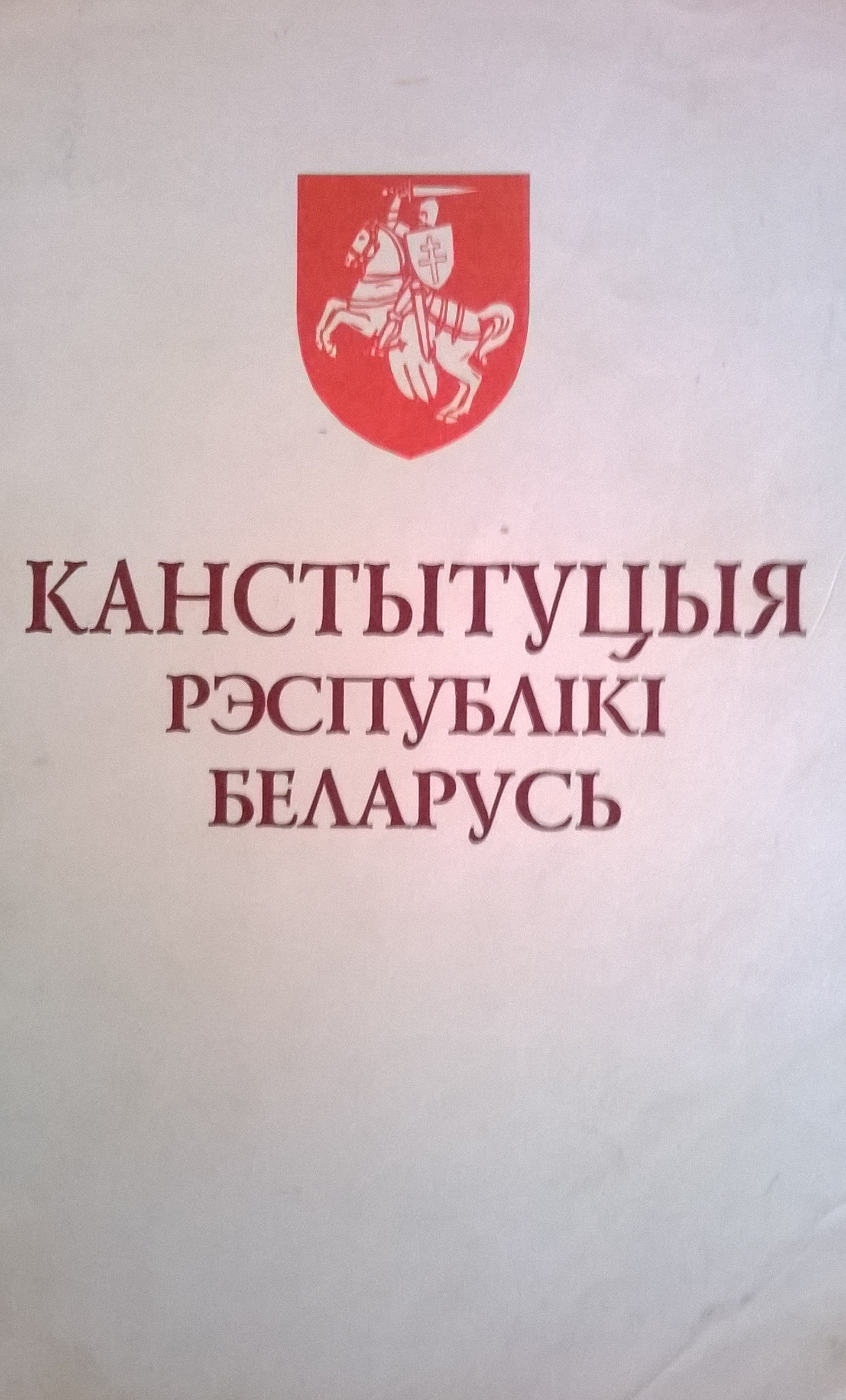 Беларуская (тарашкевіца): Вокладка Канстытуцыі Рэспублікі Беларусь 1994 года